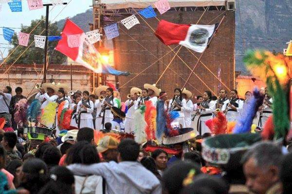 Carnaval en Tlayacapan, con la banda màs antigua de Mèxico, la banda Brìgido Santamarìa.